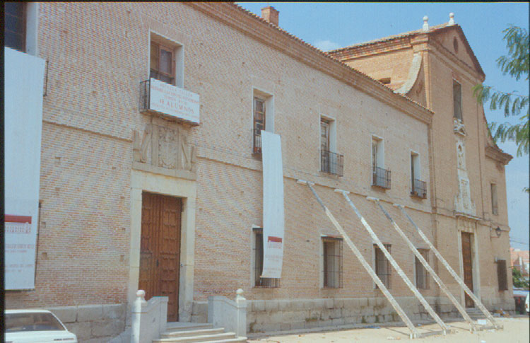 Hospital Simón Ruiz - Medina del Campo (Valladolid) - Diapositiva 48 x 48 Color